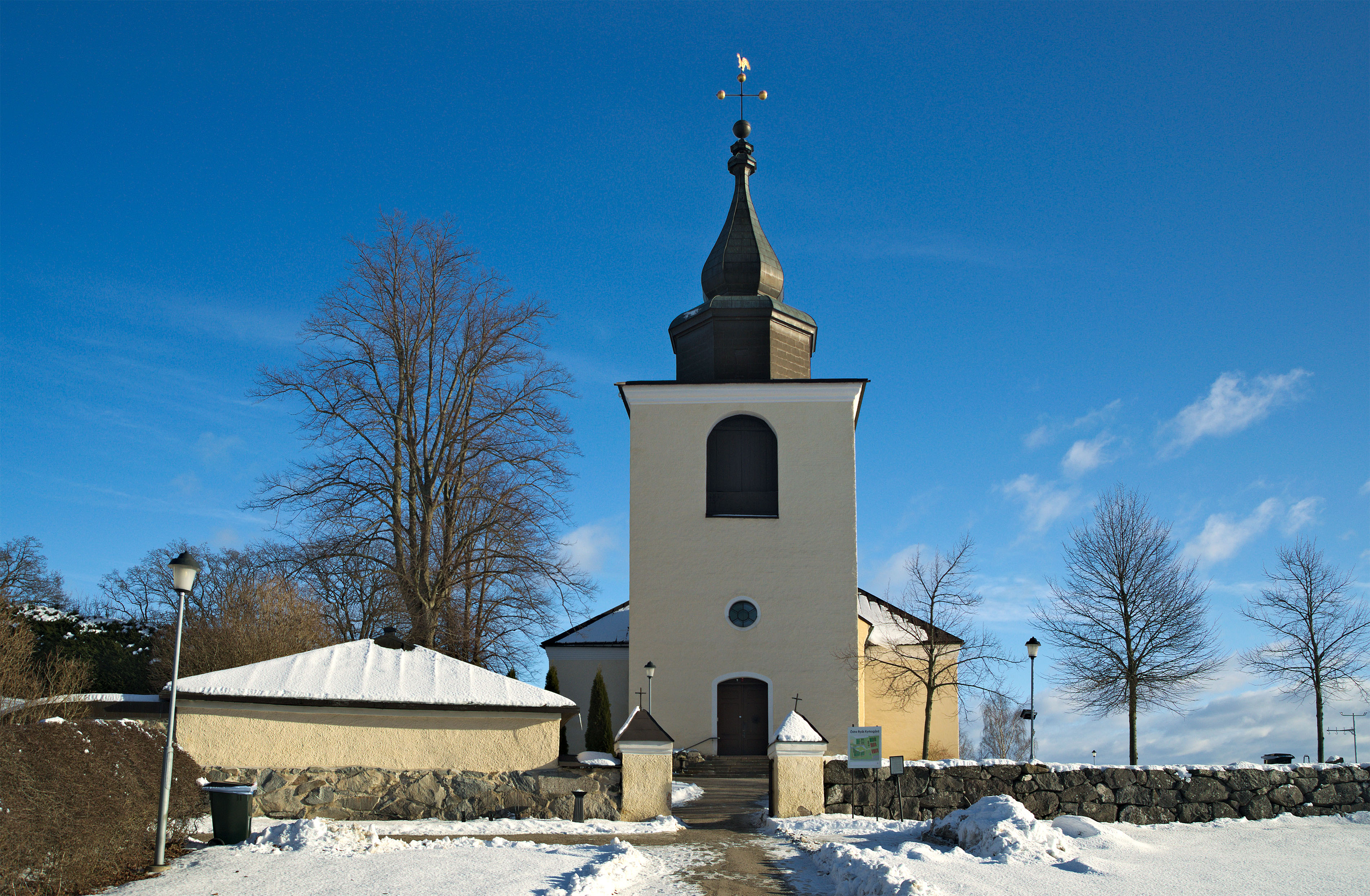 Vinterbild av Östra Ryds kyrka i Österåker